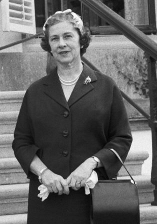 Koningin Juliana ontvangt Australische Minister for Territories en diens echtgenote.